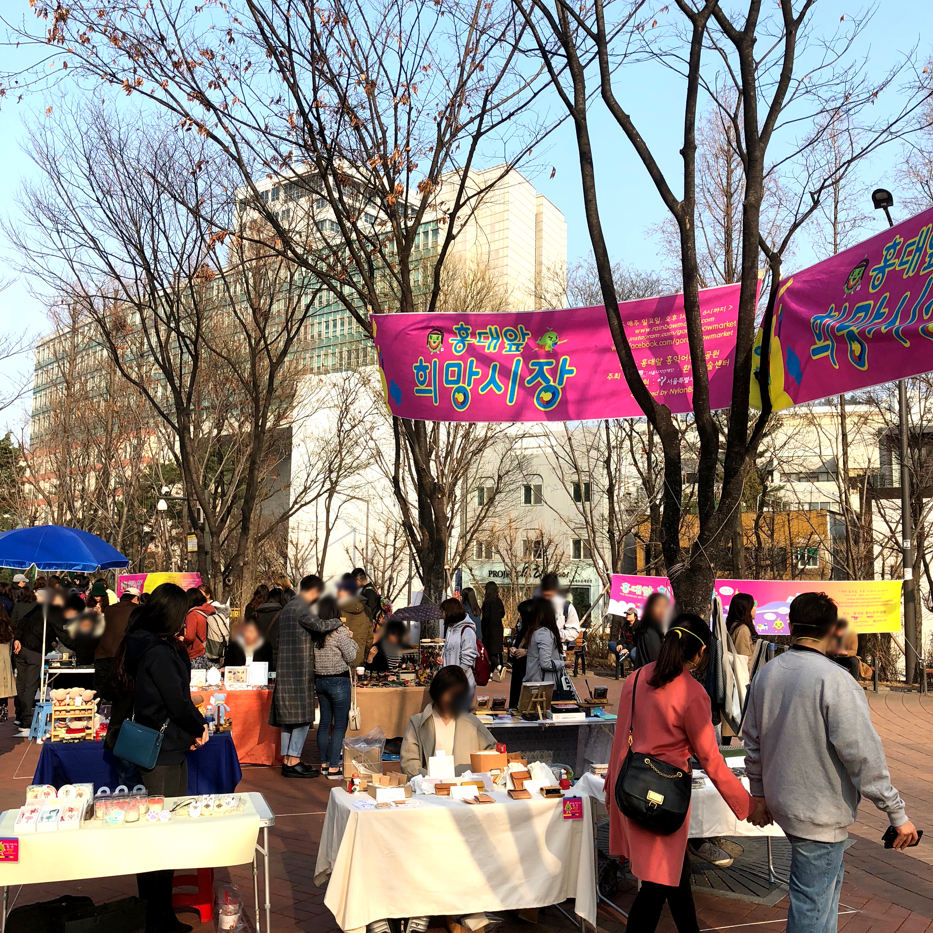 홍대앞희망시장 개최 모습.2